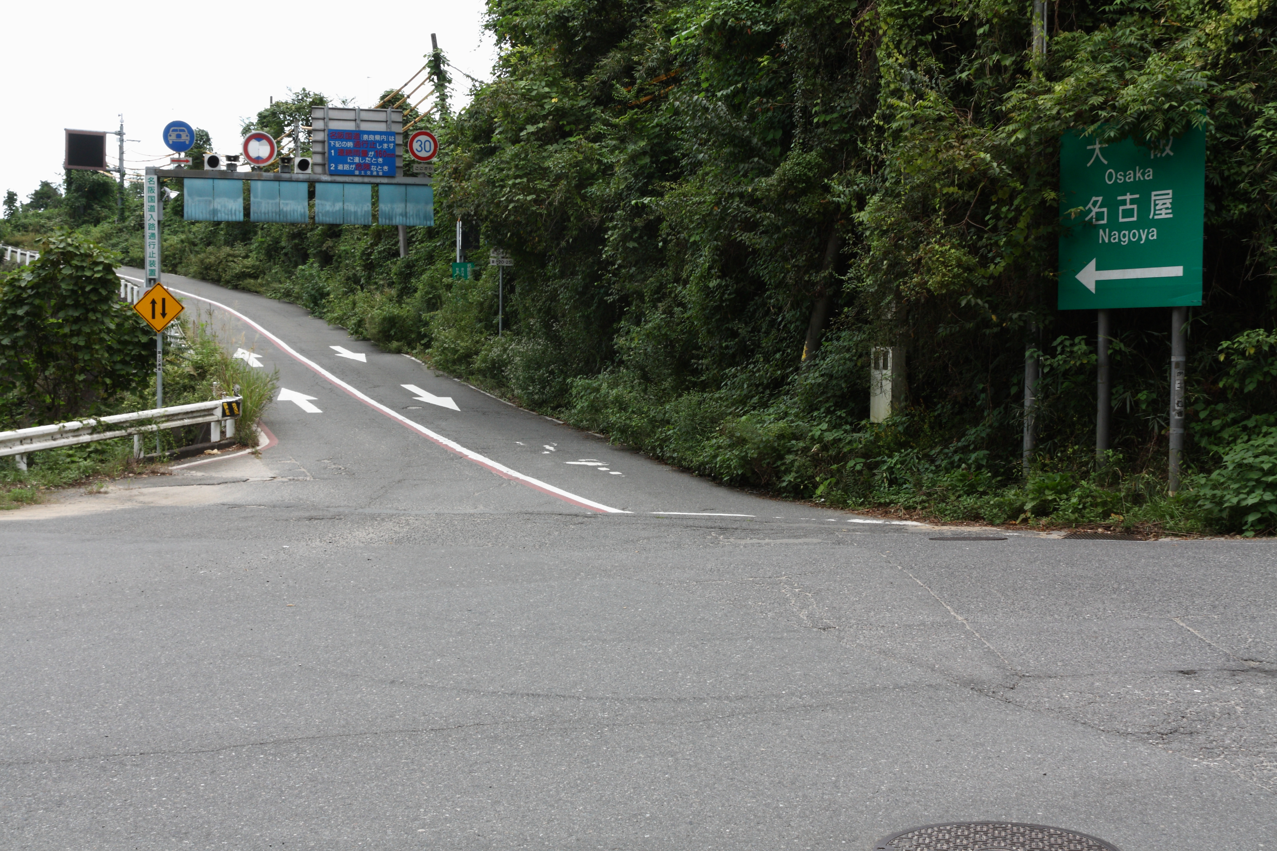 名阪国道 五月橋インターチェンジ 奈良県山辺郡山添村